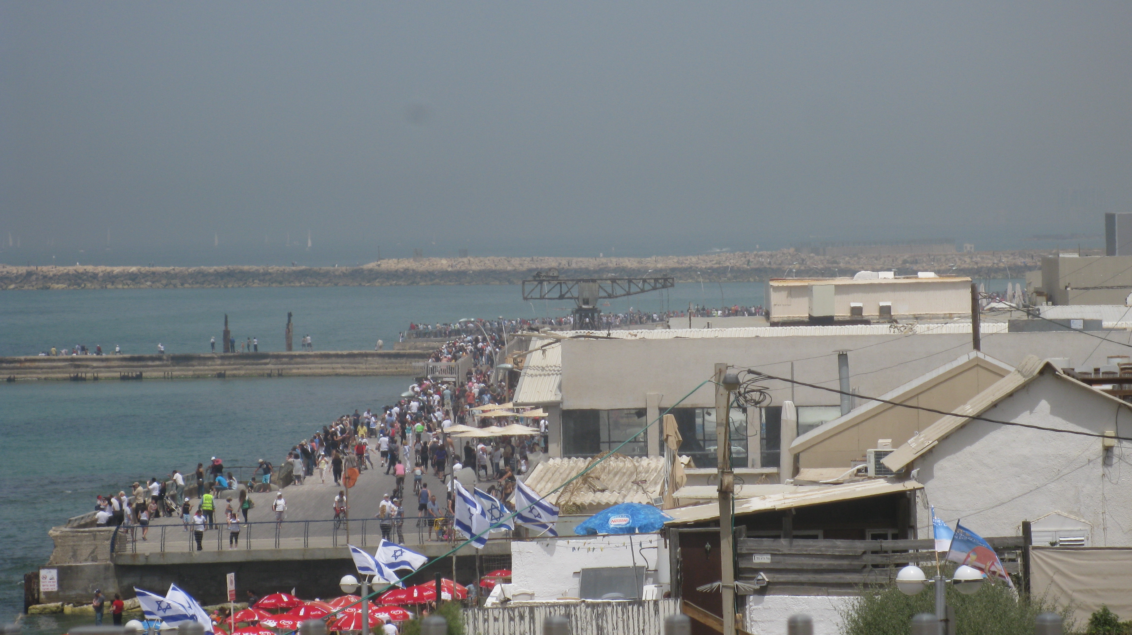 Israel 62st Independence Day יום העצמאות השישים ושתים למדינת ישראל נמל תל אביב מבט מגן העצמאות